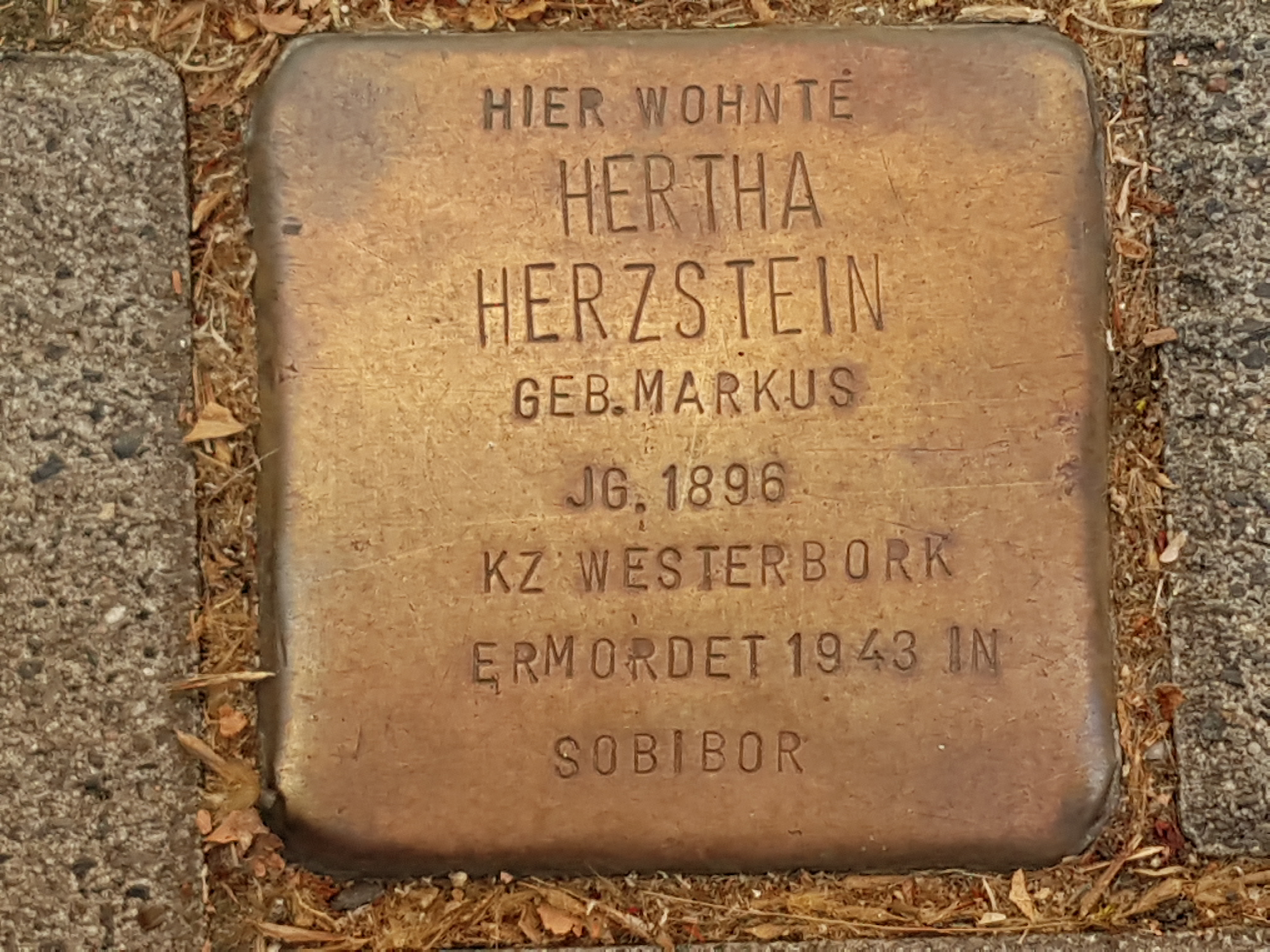 Stolperstein Duisburg